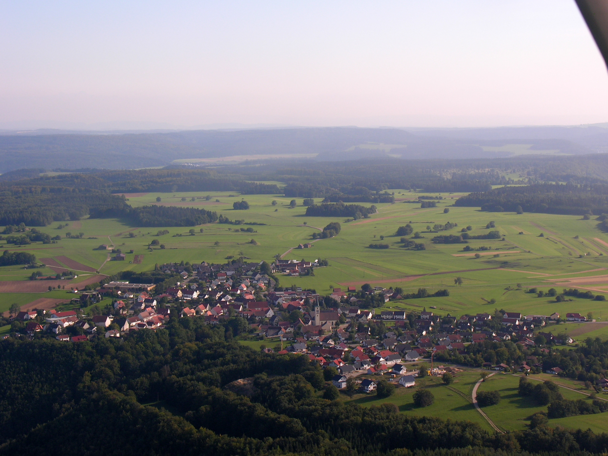 Germany, Baden-Württemberg, Aerial view of Mahlstetten